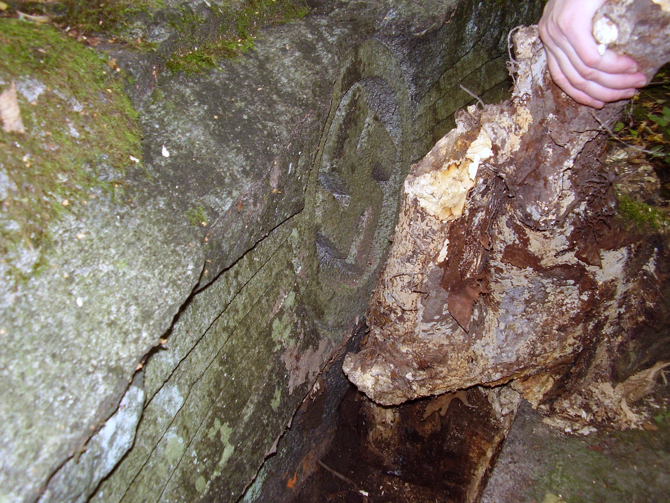 pseudomegalityczny cmantarz rodziny Dohnów (graff zu Dohna)